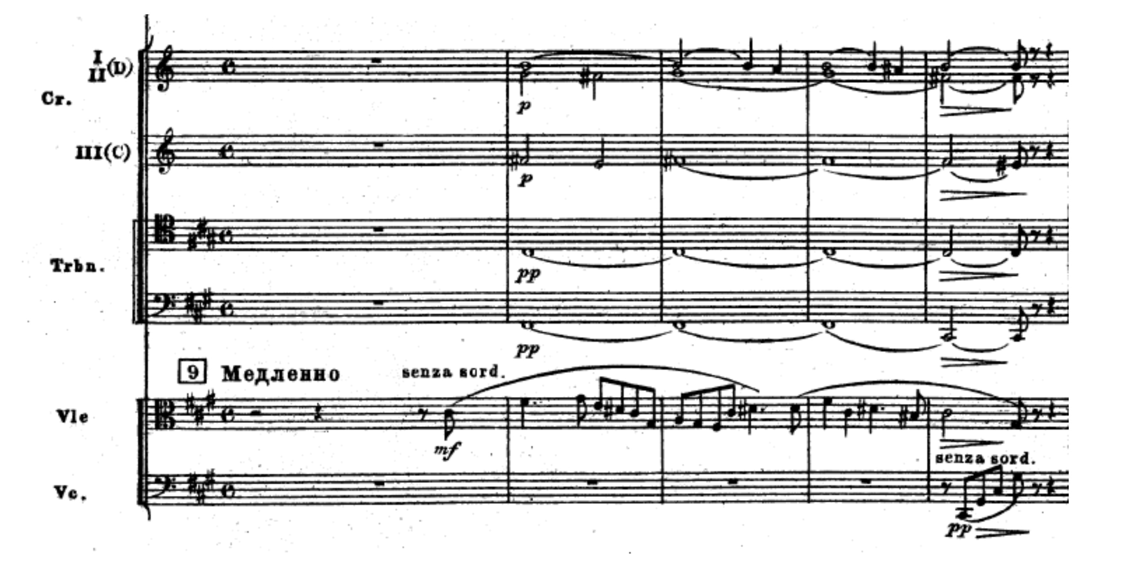 Thème d'Antan, dans la suite symphonique Antar de Rimski-Korsakov